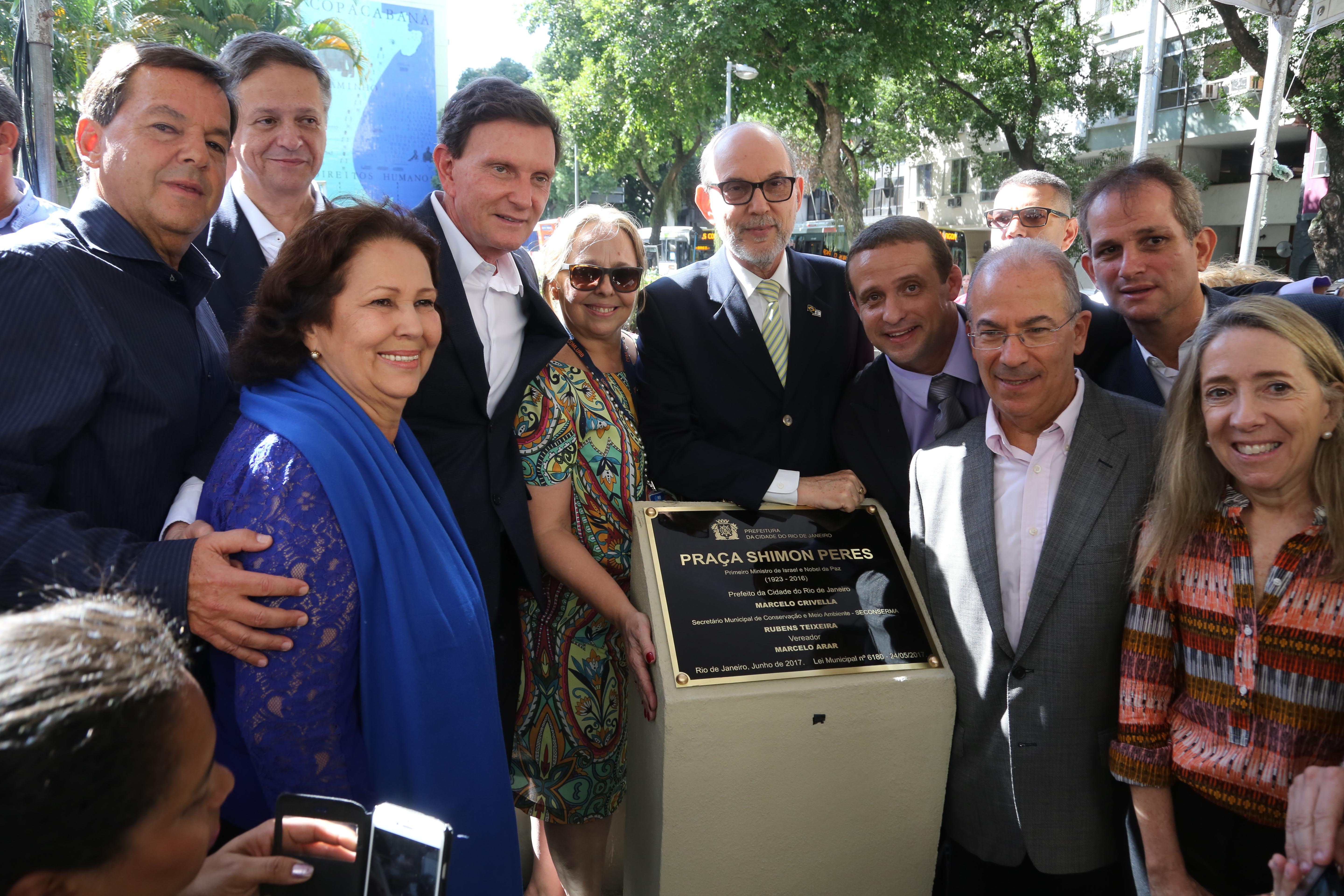 Inauguração da Praça Shimon Peres.